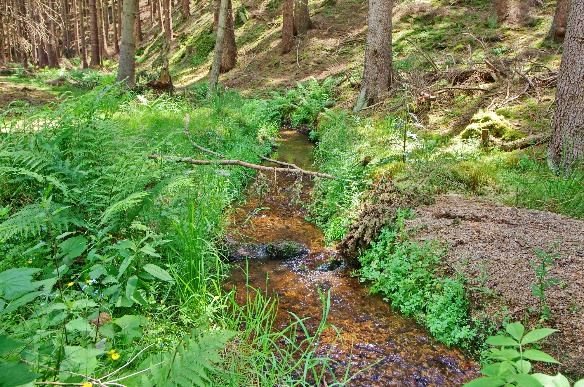 Bečovský potok v místě pod Bečovskými lesními rybníky, Slavkovský les, okres Karlovy Vary